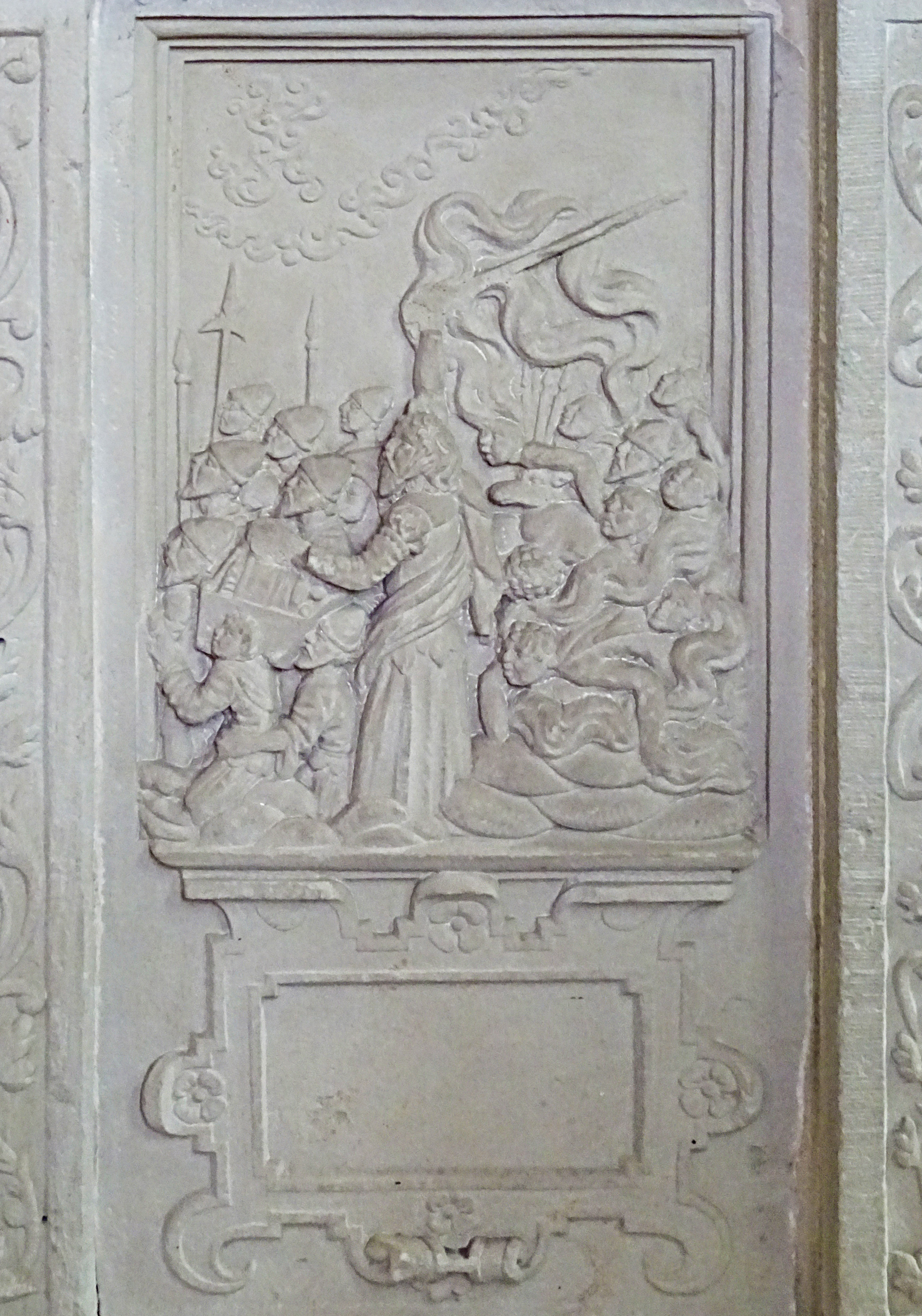 Steinbilderbibel in der St. Annenkirche (Eisleben), 15/29, Durchzug durch das Schilfmeer (Rote Meer)